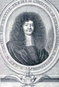 Christian Hoffmann von Hoffmannswaldau (1616-1679), deutscher Lyriker